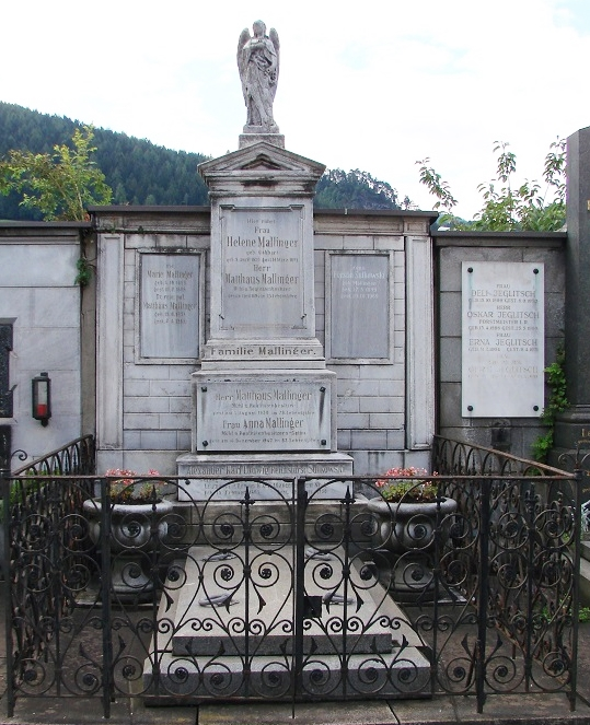 Grobowiec rodziny Mallingerów w Leoben – miejsce spoczynku prochów Aleksandra Ludwika Sułkowskiego